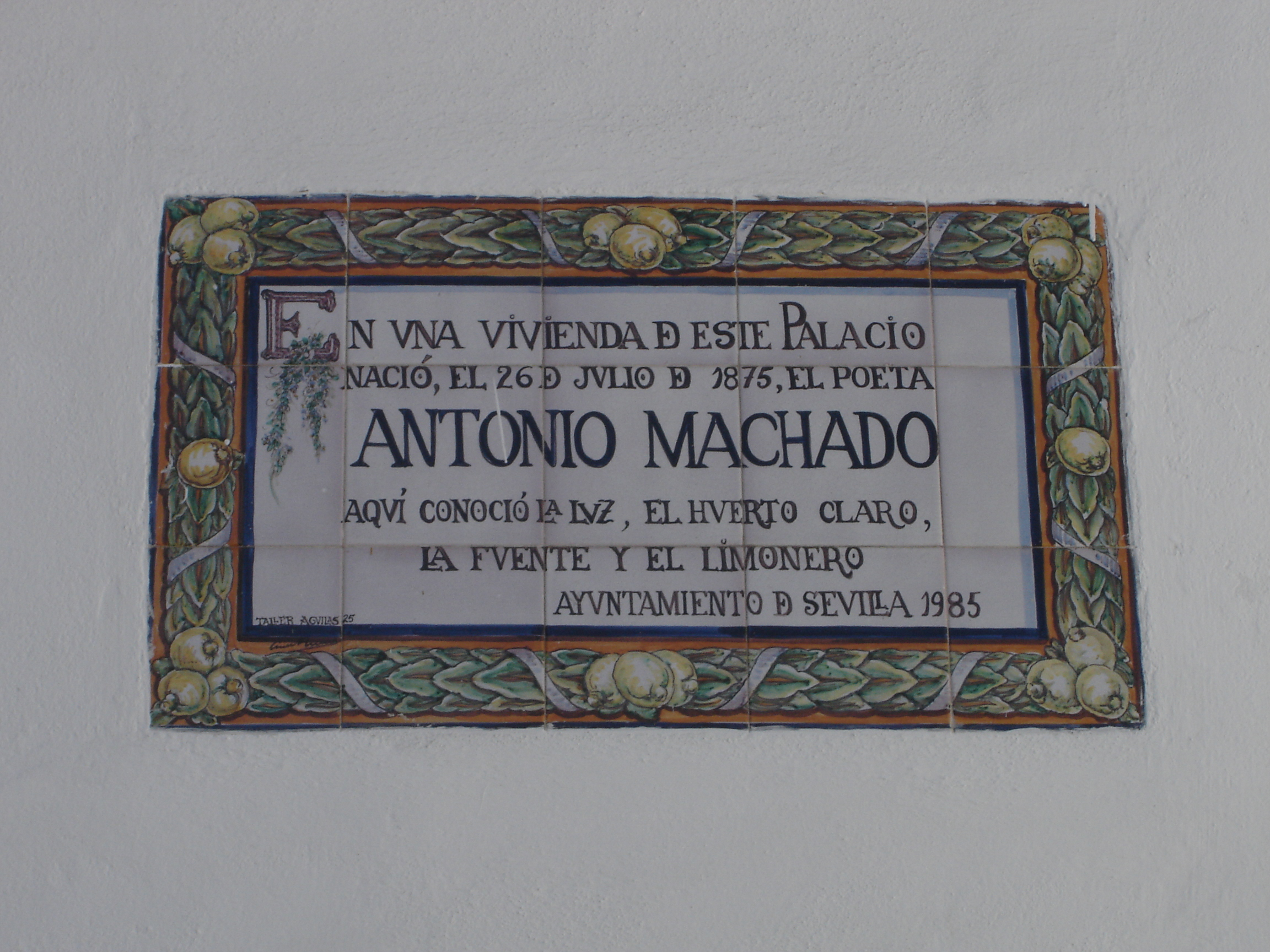 Palacio de las Dueñas (Sevilla). Azulejo indicando que ahí nació Antonio Machado. Realización propia.